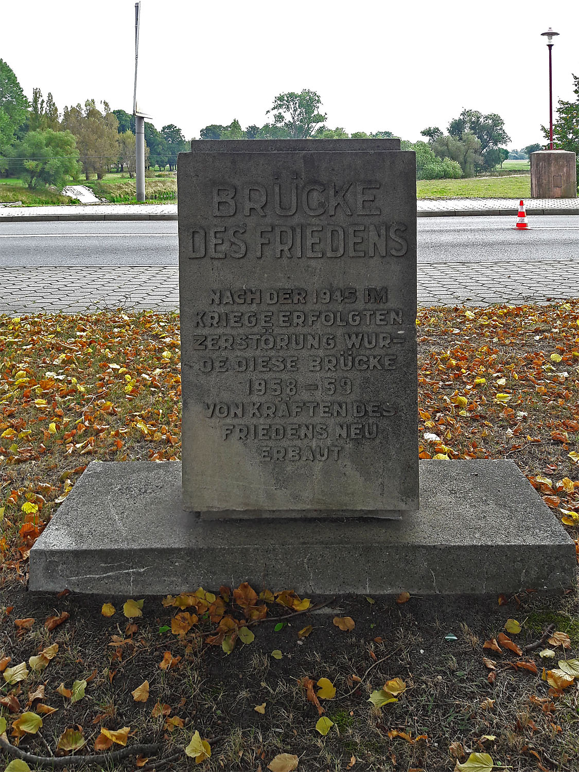 Muldebrücke Bad Düben, Gedenkstein an den Bau der "Brücke des Friedens" 1958/1959